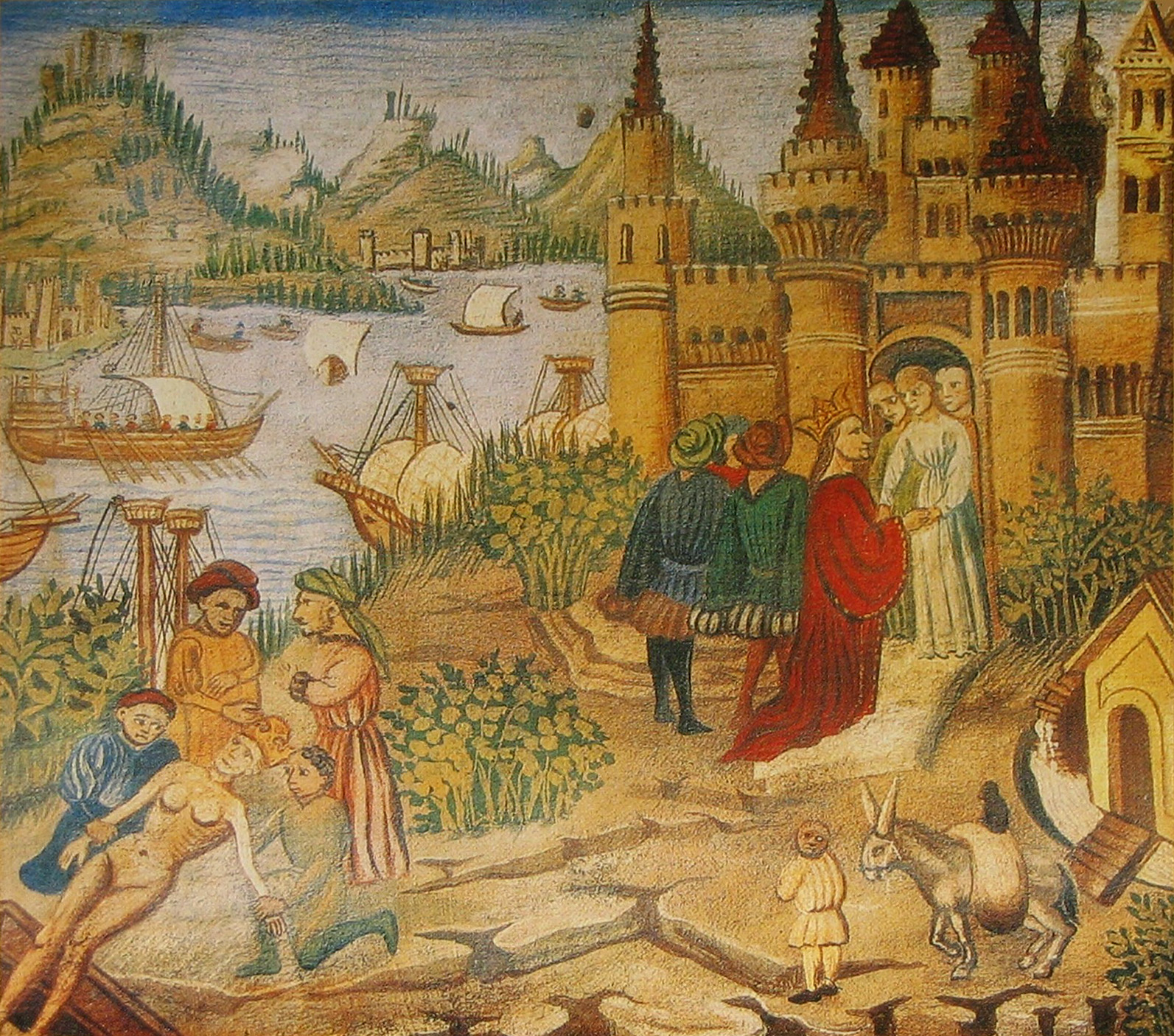 La Scuola Medica Salernitana così come appare in una miniatura del Canone di Avicenna. L'immagine rappresenta la storia leggendaria di Roberto, duca di Normandia. Ferito mortalmente da una freccia, fu salvato eroicamente dalla moglie che ne succhiò il veleno come era stato prescritto dai medici di Salerno.